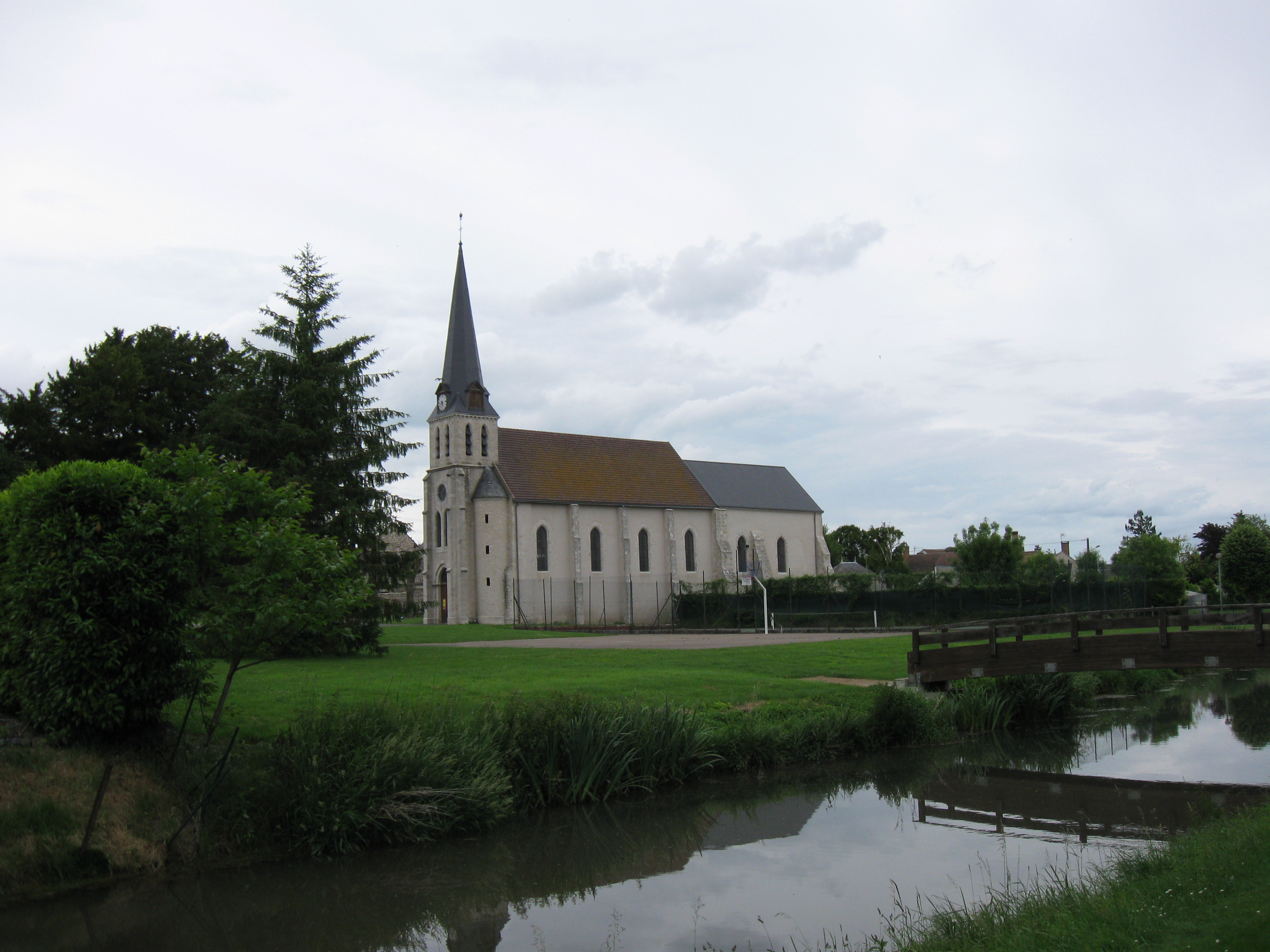 L'église Saint-Saturnin de Sceaux-du-Gâtinais. (département du Loiret , région Centre)